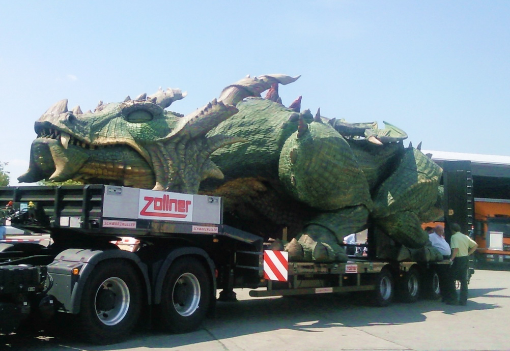 der Further Drache Tradinno beim Transport auf einem Tieflader